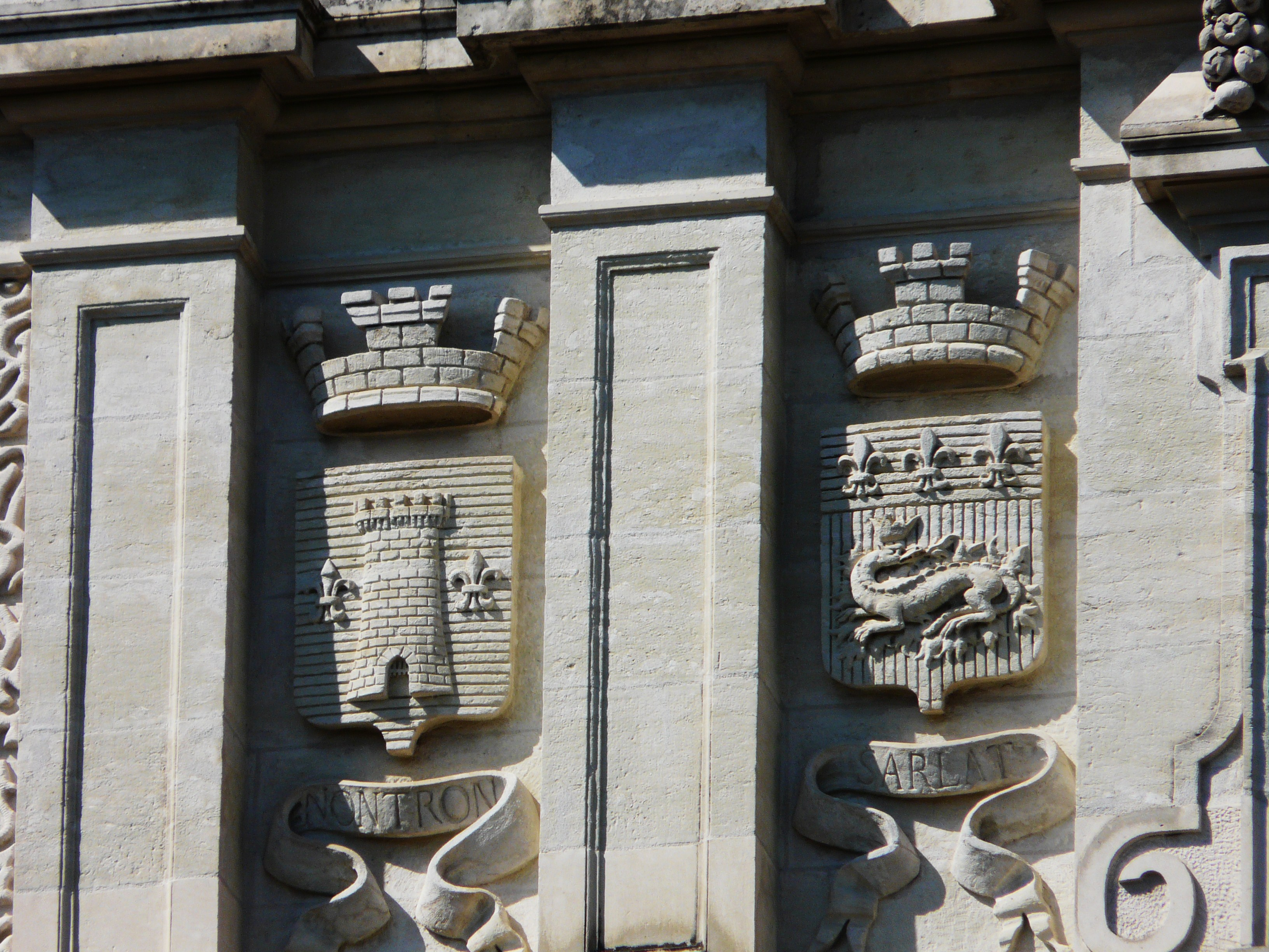 Blasons de Nontron et Sarlat sur la façade de la Préfecture de la Dordogne, à Périgueux